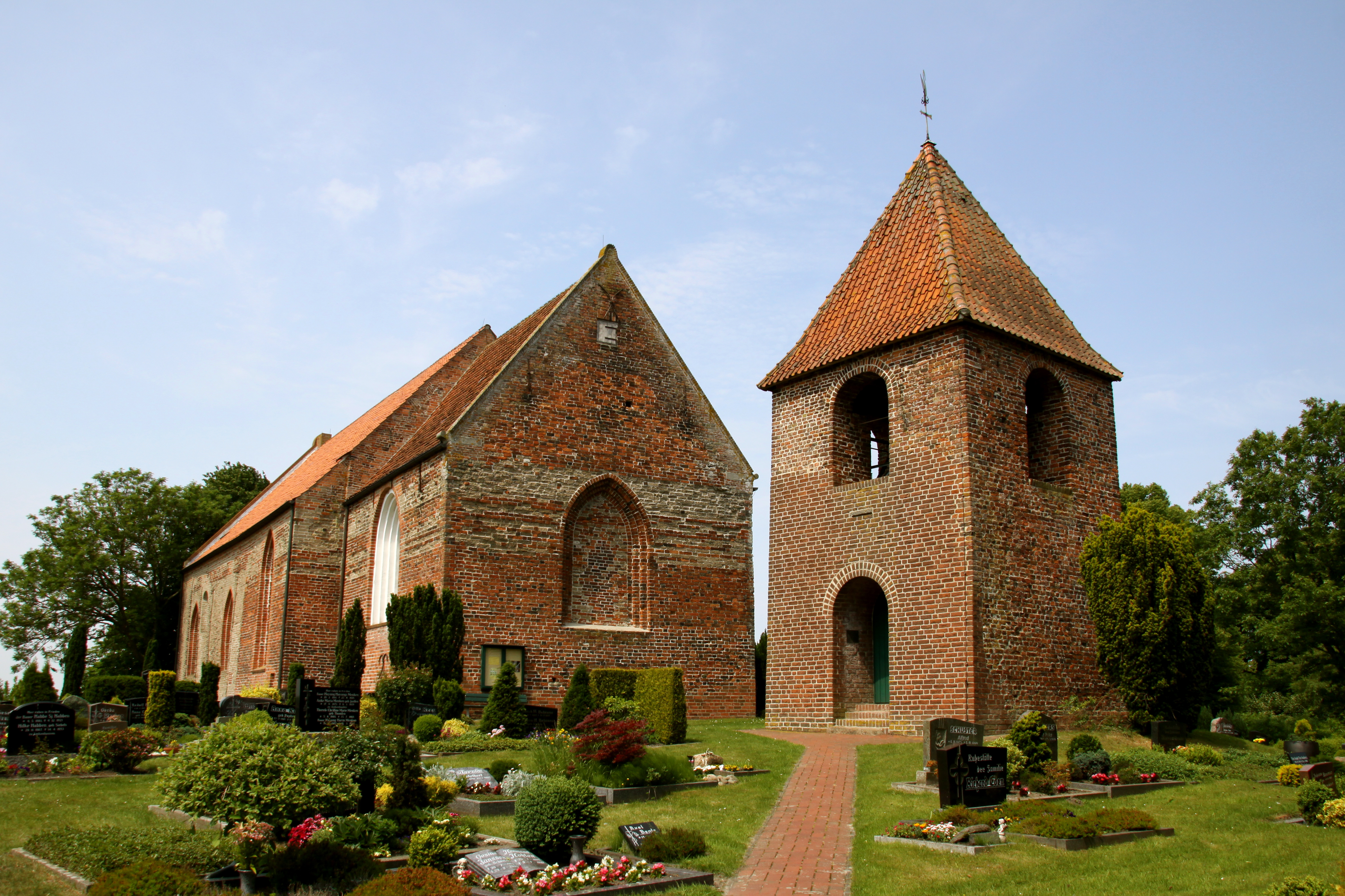 St. Aegidien-Kirche in Stedesdorf